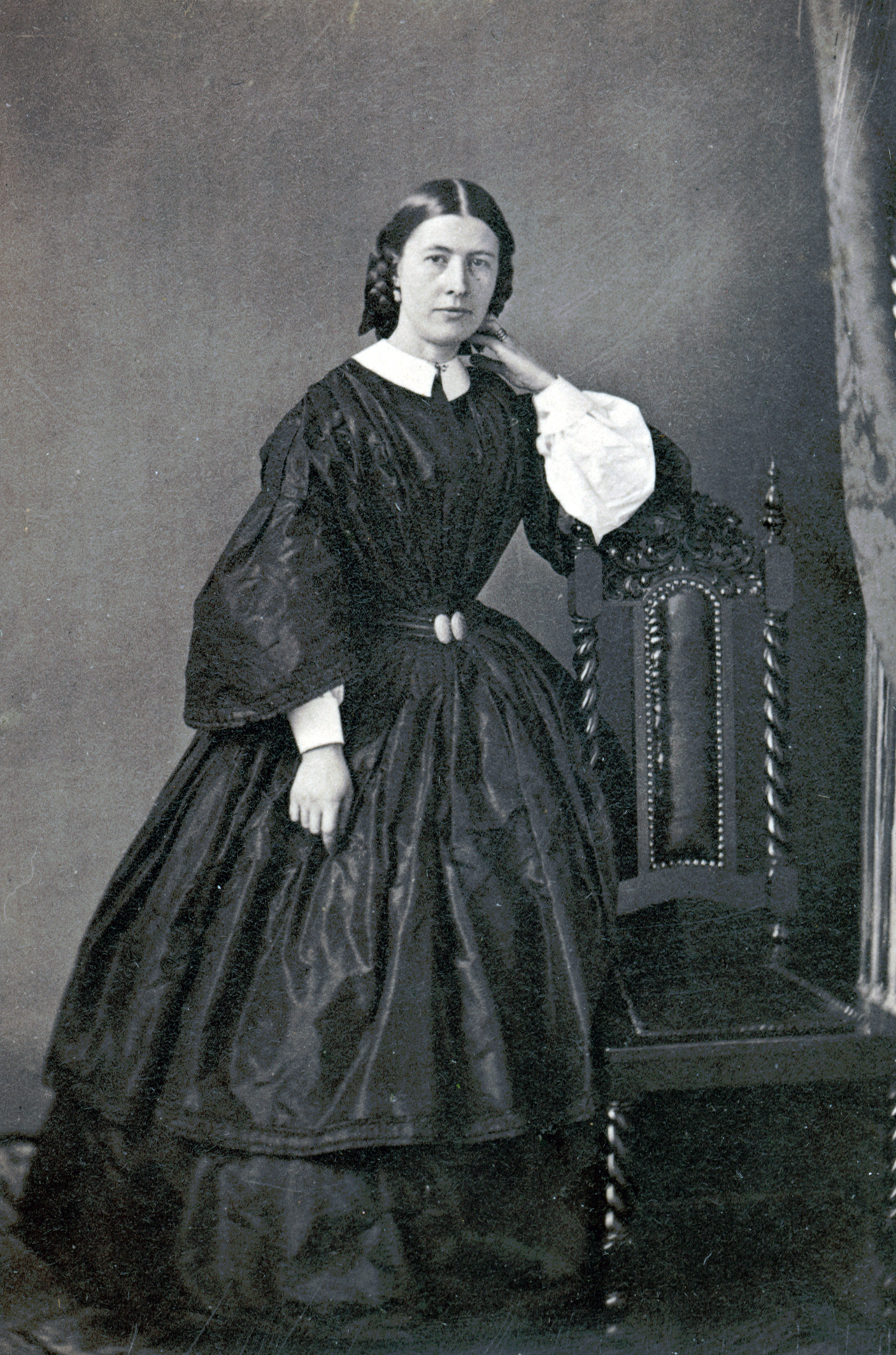 Johanna Sundberg, dansare vid Kungliga Operan 1861